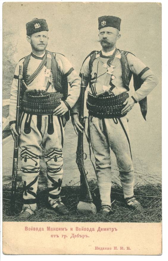 Войводите Максим Ненов и Димитър Стефанов.